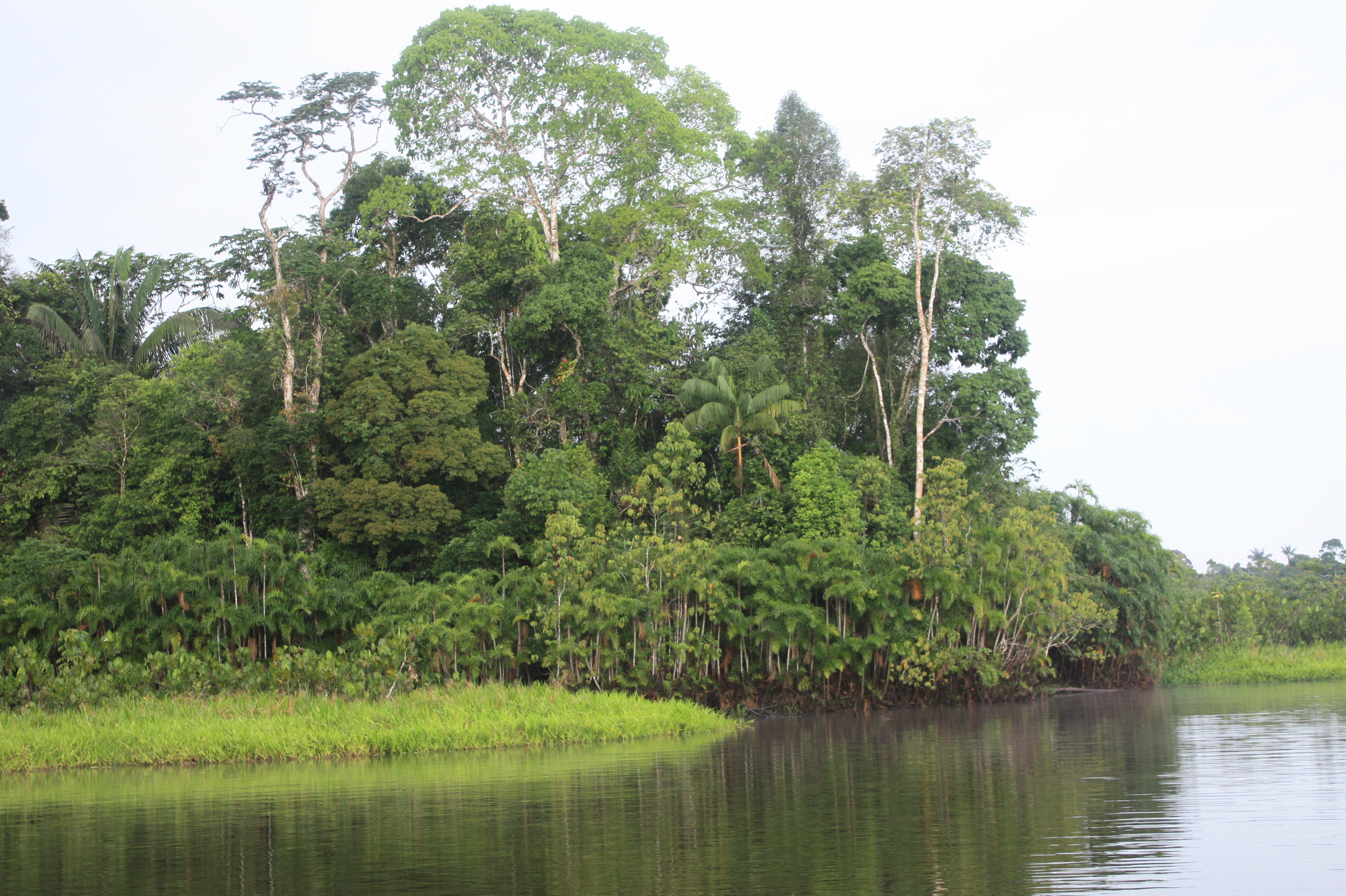 Parque Nacional Yasuní Ecuador